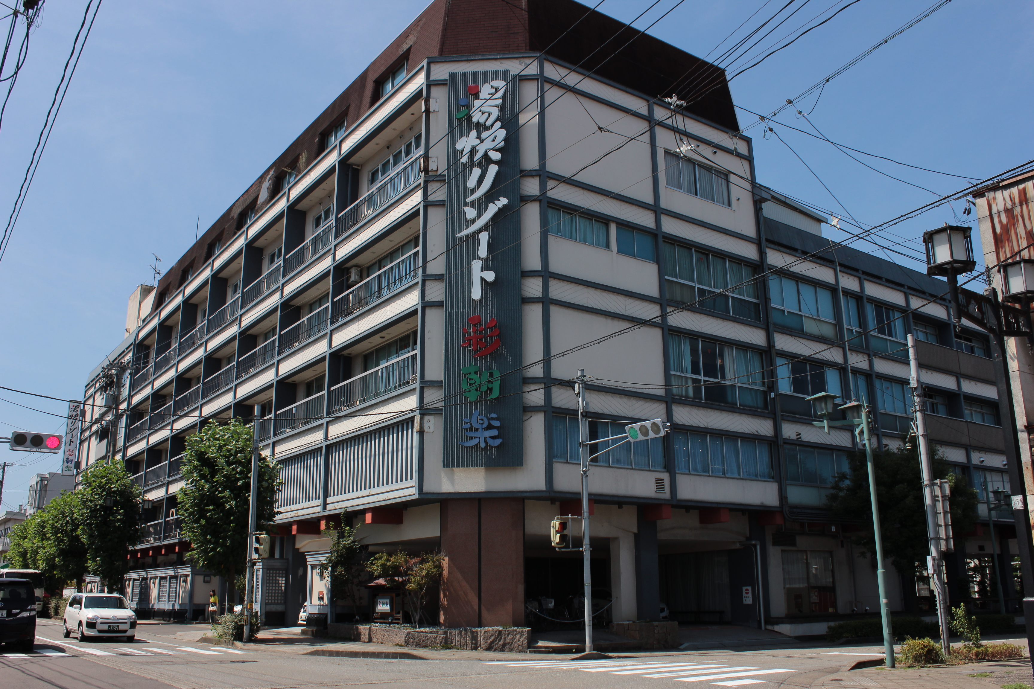 湯快リゾート彩朝楽（石川県加賀市山代温泉） Canon EOS Kiss X5